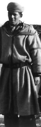 Un Moghani dans une S.A.S. pendant la guerre d'Algérie